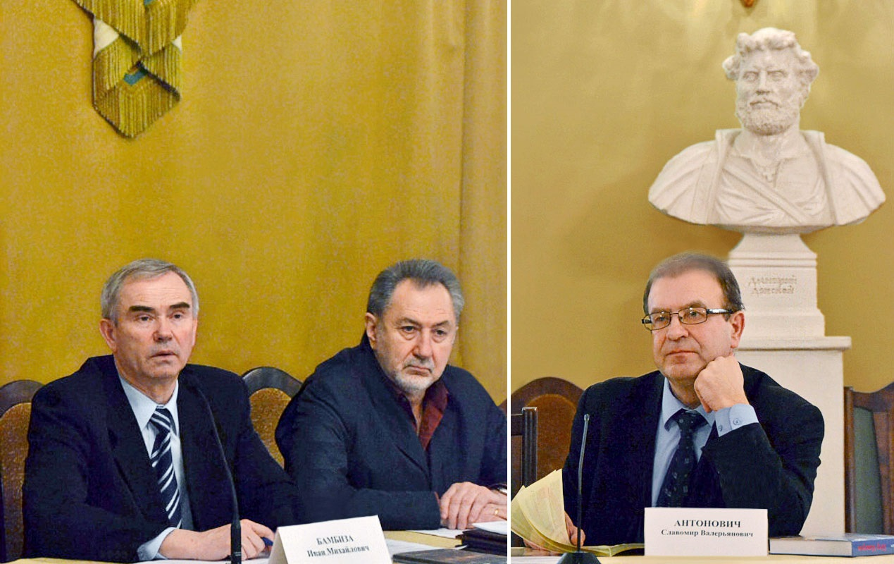 фото